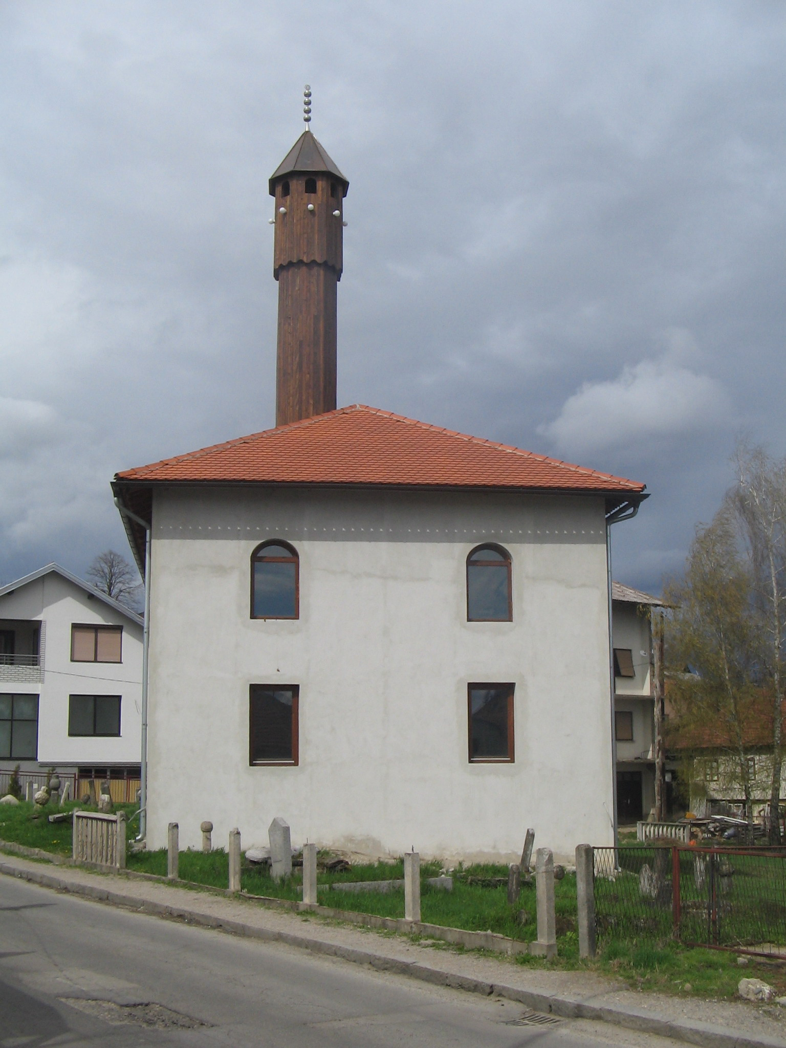 Хаџи_Османија_или_Талина_џамија